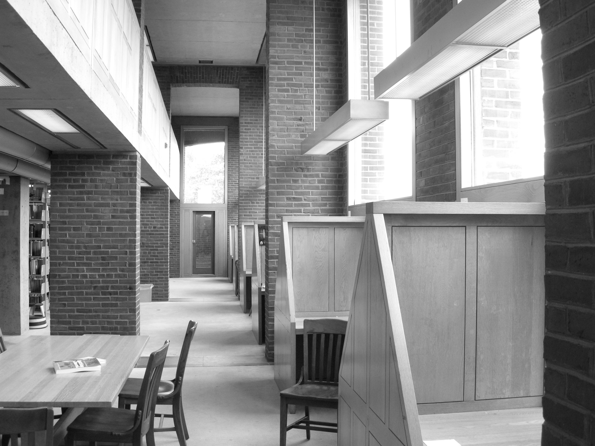 Phillips Exeter Academy library carrels